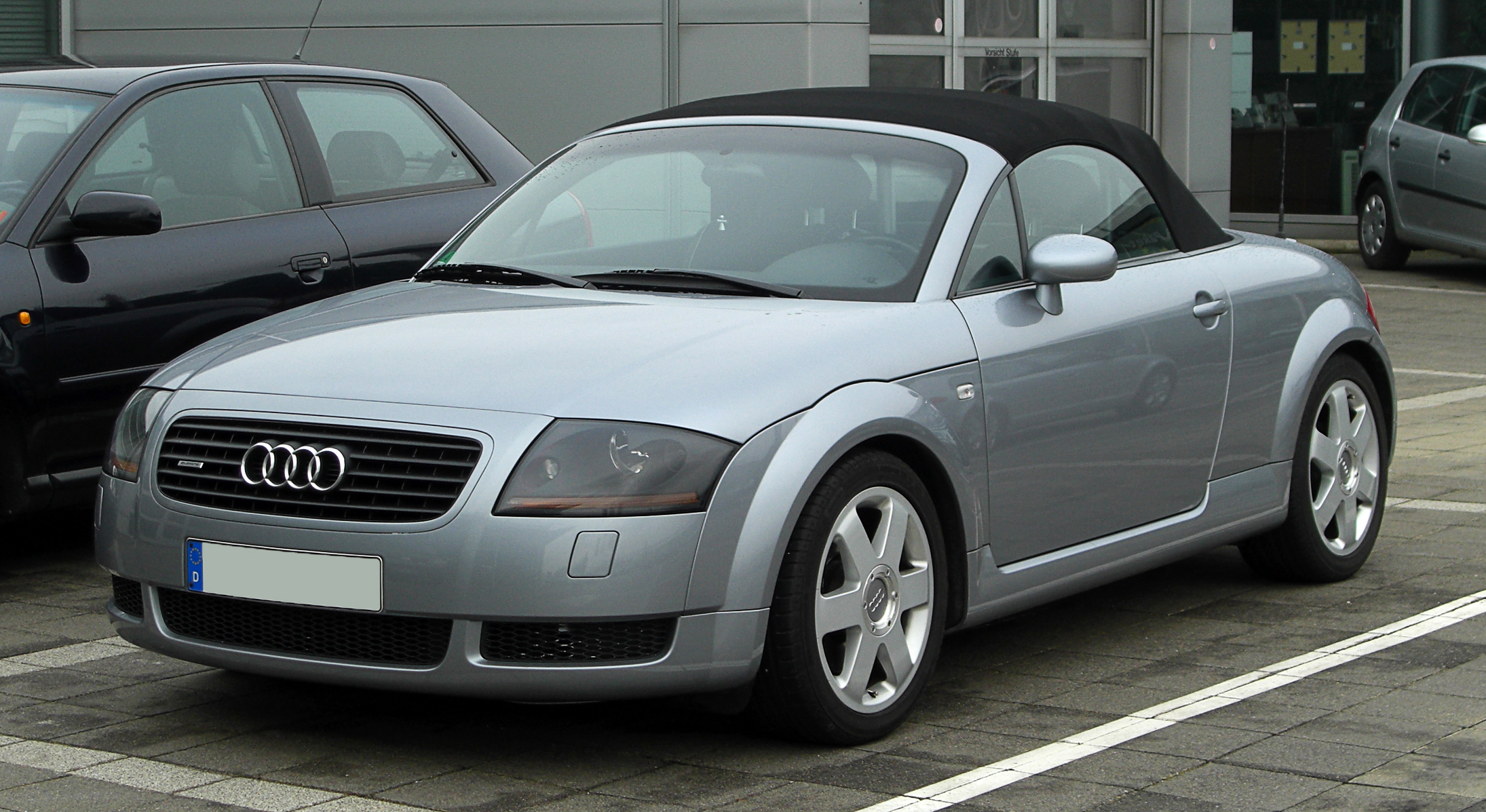 Audi TT Roadster 1.8 T quattro (8N, Facelift)